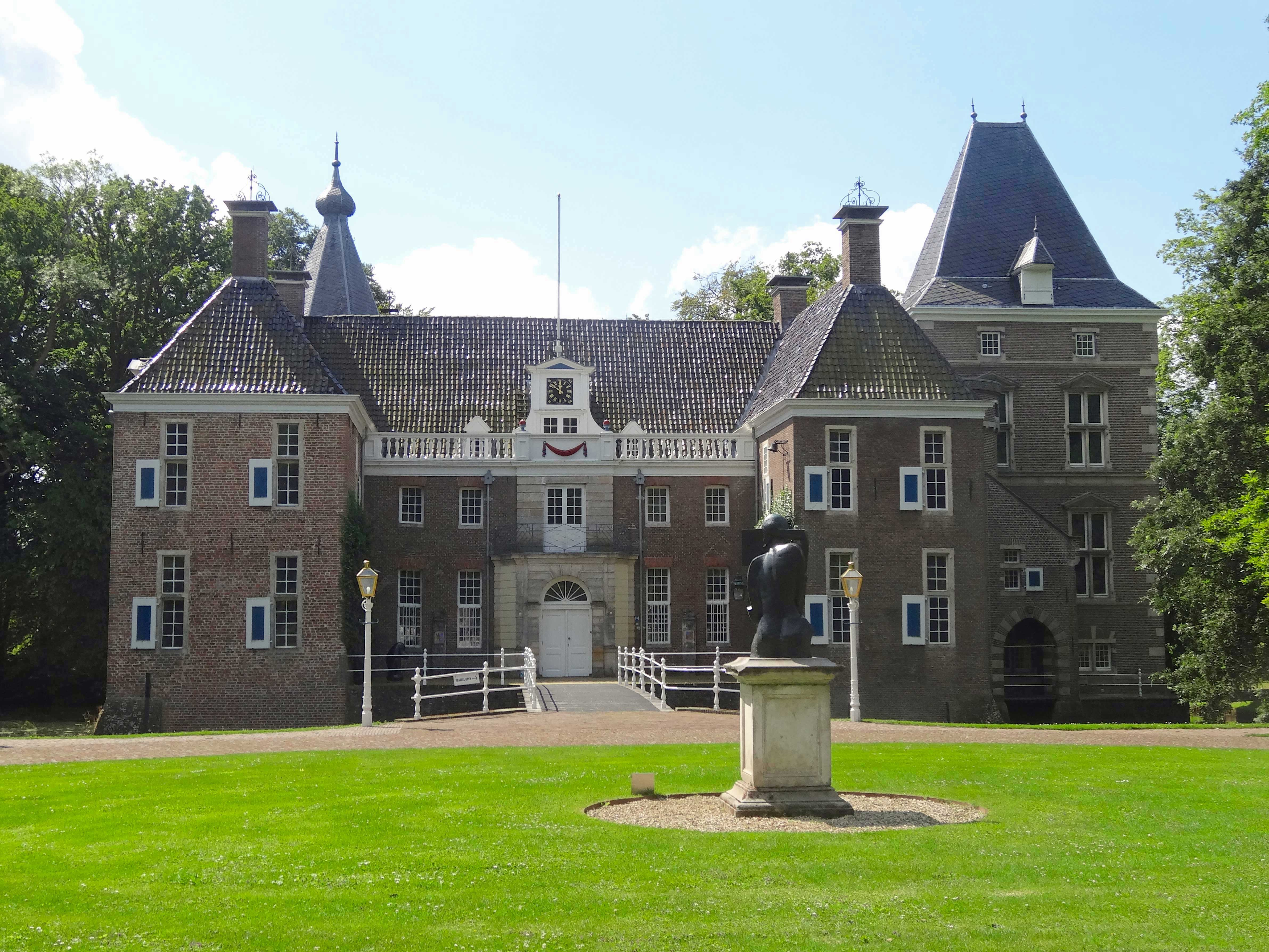 Het Nijenhuis in de gemeente Olst-Wijhe, nabij Heino in de gemeente Raalte